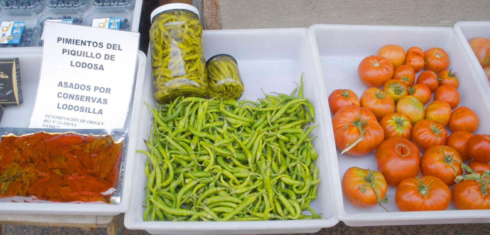 Logroño